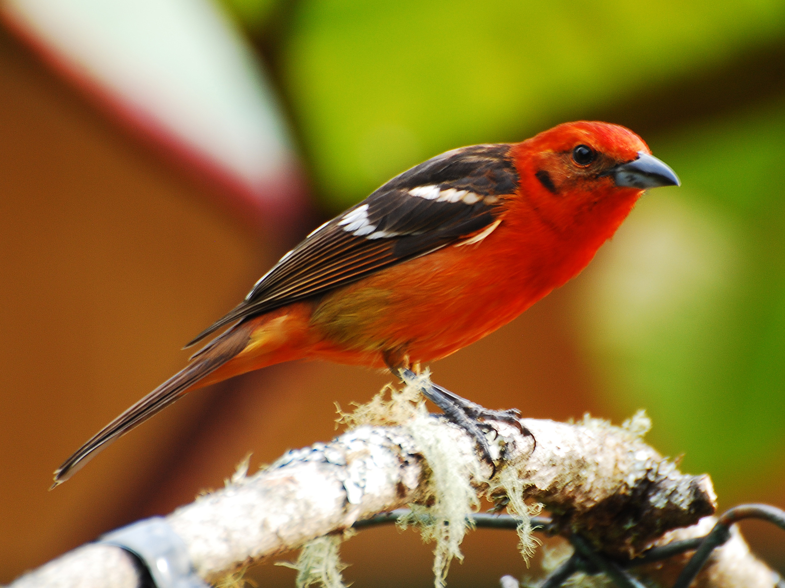 Flame-colored Tanager at Savegre Lodge, Costa Rica, 080226. Piranga bidentata.